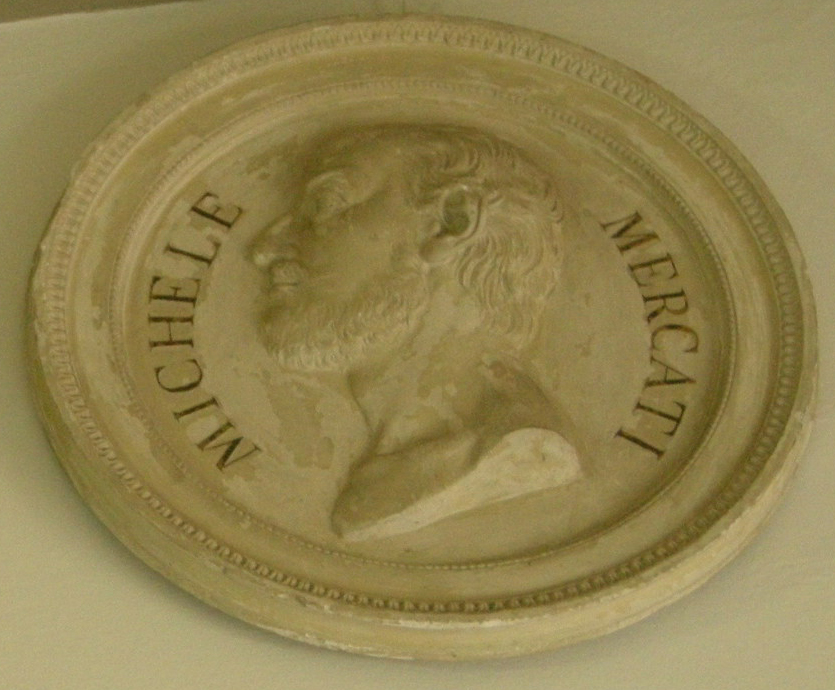 Specola, medaglione di michele mercati